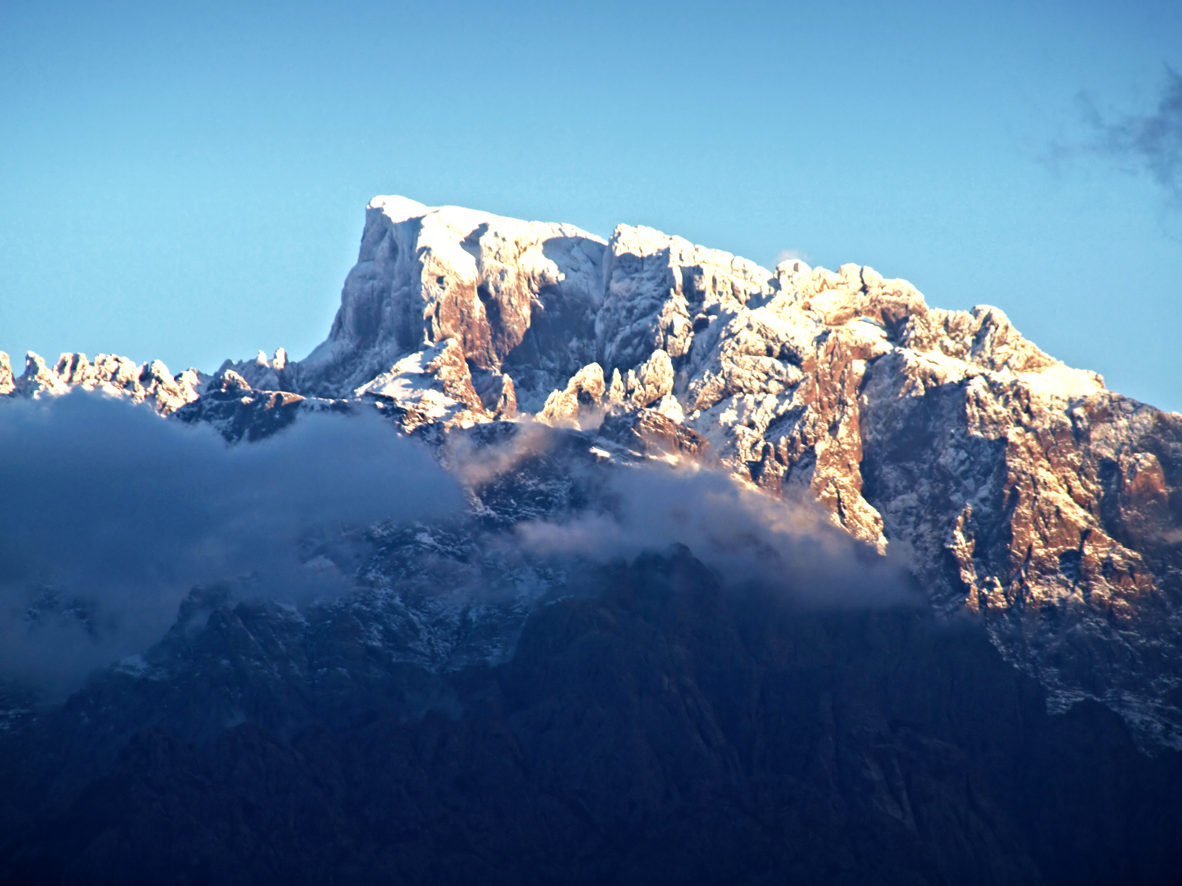 Galéria (Corsica) - Vue de la Paglia Orba (2525 m - Albertacce) et du Capu Tafunatu ("sommet troué") (2335 m - Manso) à droite, d'une distance orthodromique d'environ 18 km.